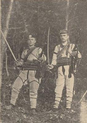 Ставре Андрев и Коста Божинов